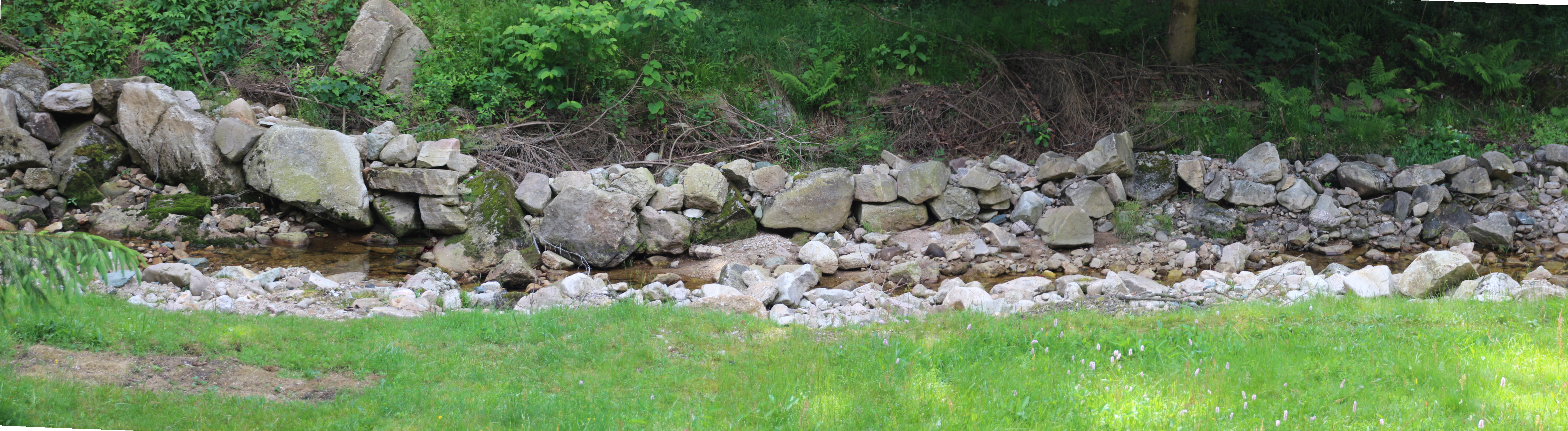 Große Pyra: Verlauf des Flusses im Bereich des Ortsteils Morgenröthe von Morgenröthe-Rautenkranz unterhalb der Mündung des Markersbachs entlang der Straße von der Zwickauer Mulde Richtung der Ortschaft Sachsengrund, die den Namen „Pyratalstraße“ trägt.